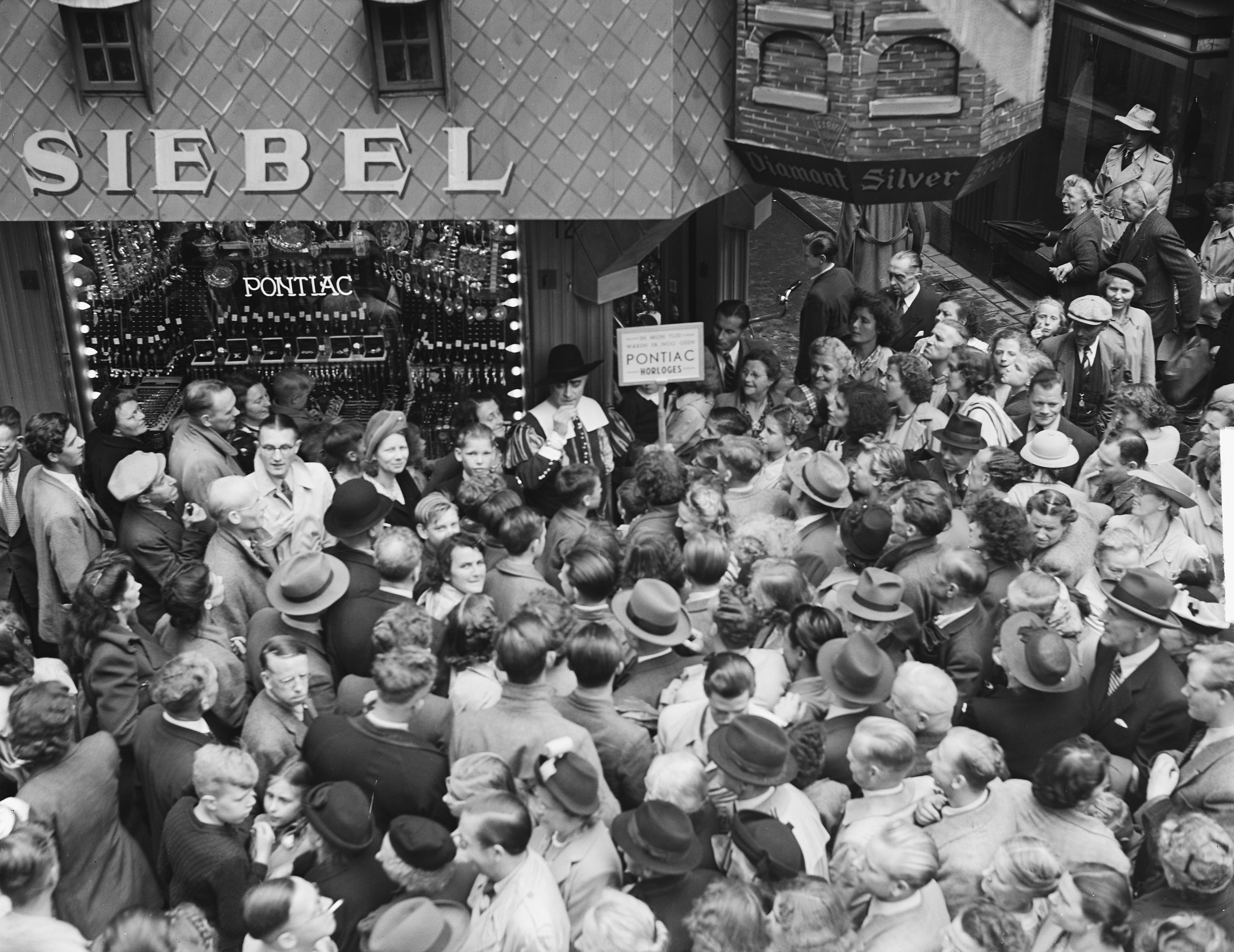 Collectie / Archief : Fotocollectie Anefo Reportage / Serie : [ onbekend ] Beschrijving : Opdracht firma Kinsbergen Oosteinde Datum : 20 juni 1950 Trefwoorden : opdrachten Fotograaf : Bilsen, Joop van / Anefo Auteursrechthebbende : Nationaal Archief Materiaalsoort : Glasnegatief Nummer archiefinventaris : bekijk toegang 2.24.01.09 Bestanddeelnummer : 904-0374 Reacties Geplaatst door Amsterdammertje op 09 september 2016 - 22:07. Viering 500 jaar Kalverstraat. Bij Siebel juwelier is aan de gevel een miniatuur Munttoren gebouwd. Persoon in Oud-Hollandse kleding maakt reclame voor horloges. Plaats: Amsterdam, Noord-Holland NB. de firma A. Kinsbergen NV. was een importeur van diverse merken horloges en gevestigd aan het Oosteinde 9 te Amsterdam